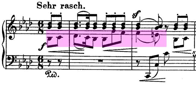 Schumann: Fantasiestücke op. 12, 2 Aufschwung